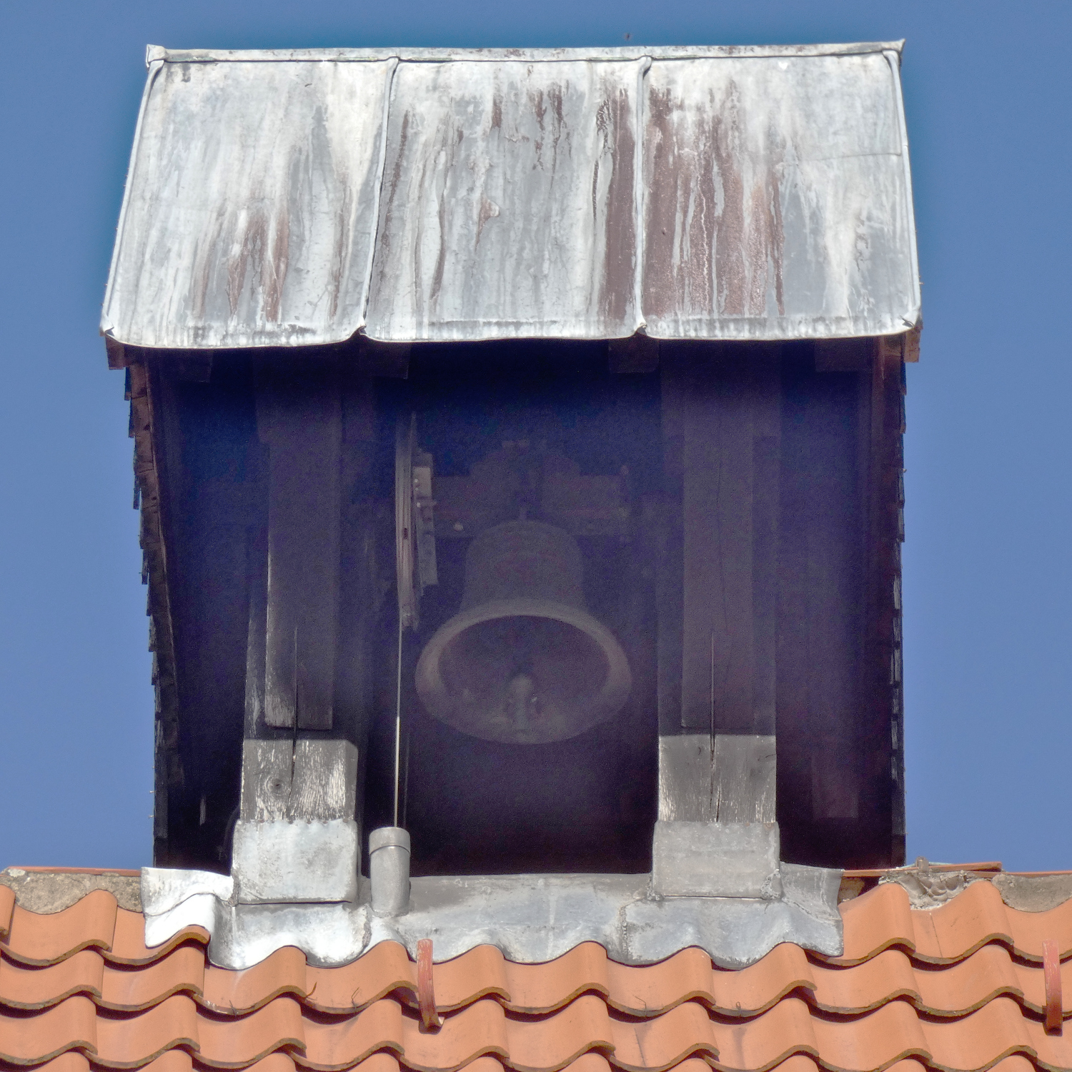 Dachreiter der Kapelle Devese mit der noch immer genutzten Glocke. Diese wurde im Jahr 1643 durch Ludolf Siegfriedt gegossen